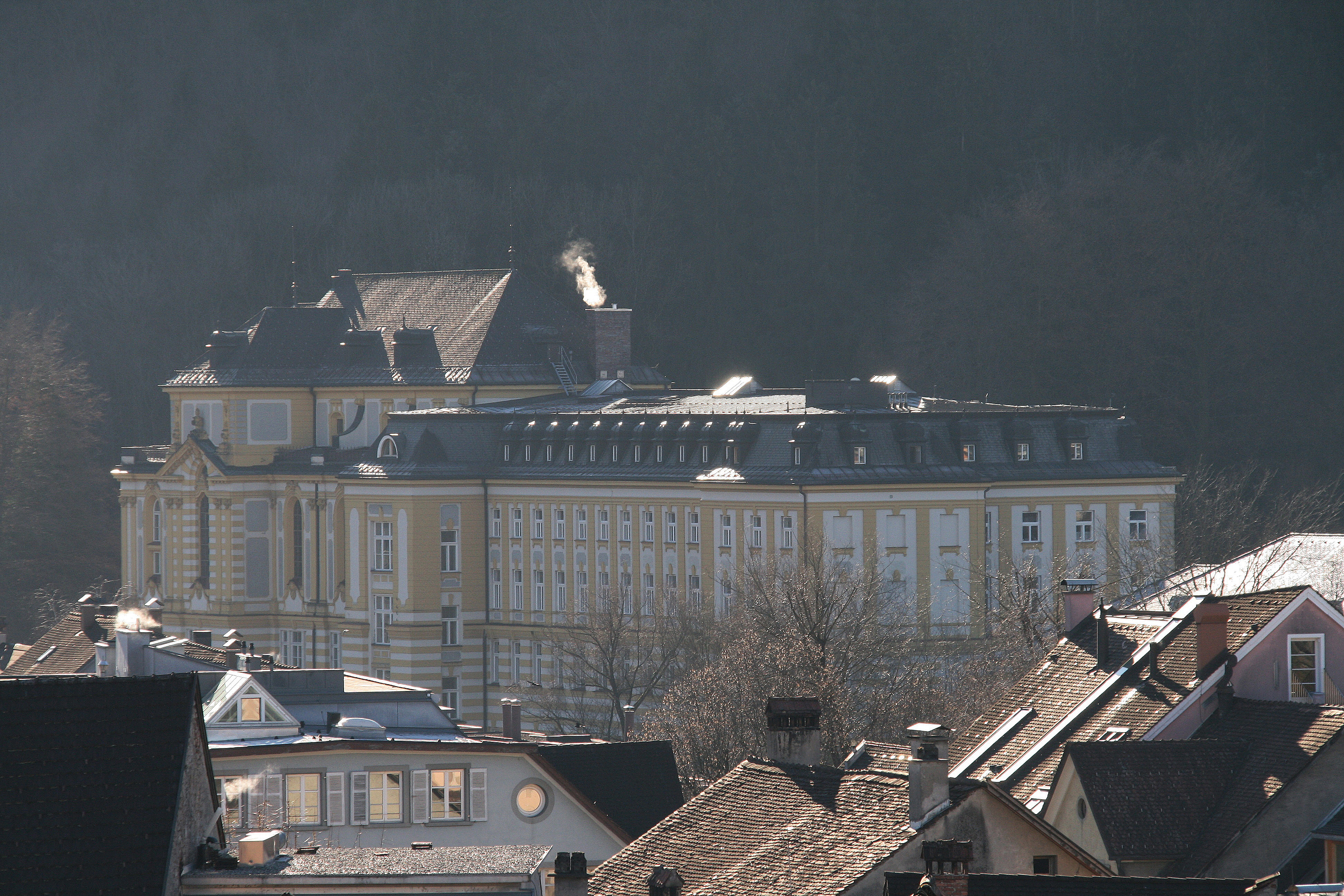 Blick von der Ardetzenbergstrasse auf das Stella Matutina, heute Landeskonservatorium wurde 1899 durch Peter Hutter in Feldkirch, Vorarlberg erbaut.